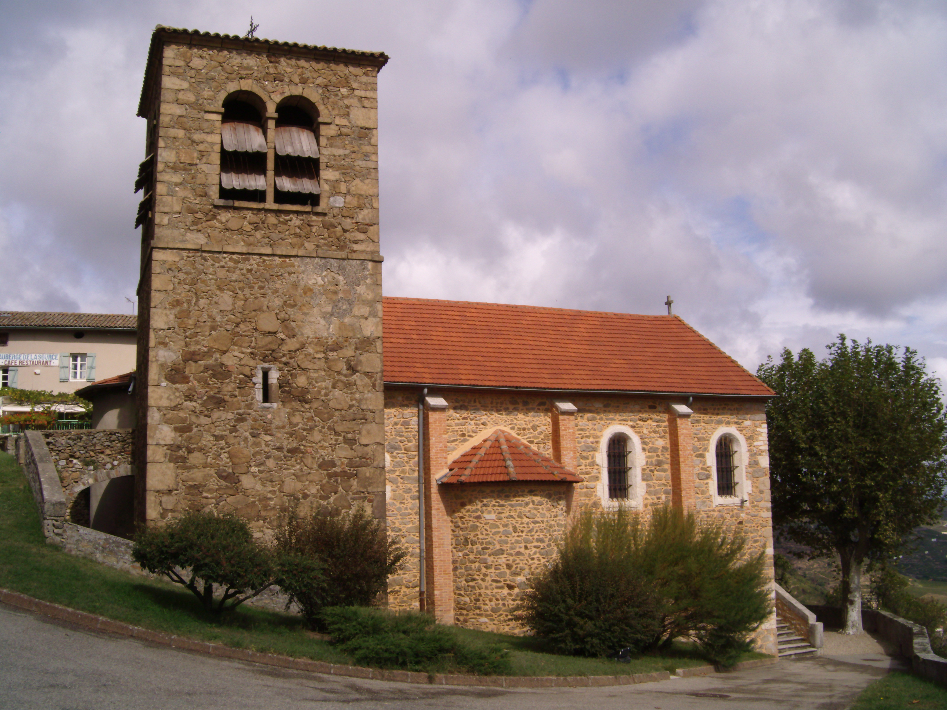 Église de Semons (Rhône)